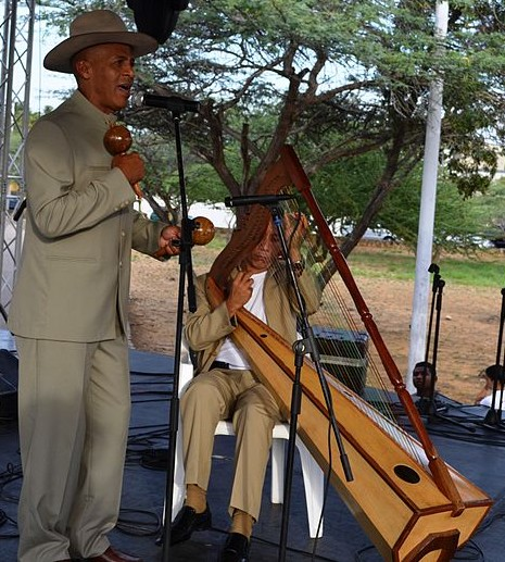 maracas e arpa veneçuelanas jogant lo joropo